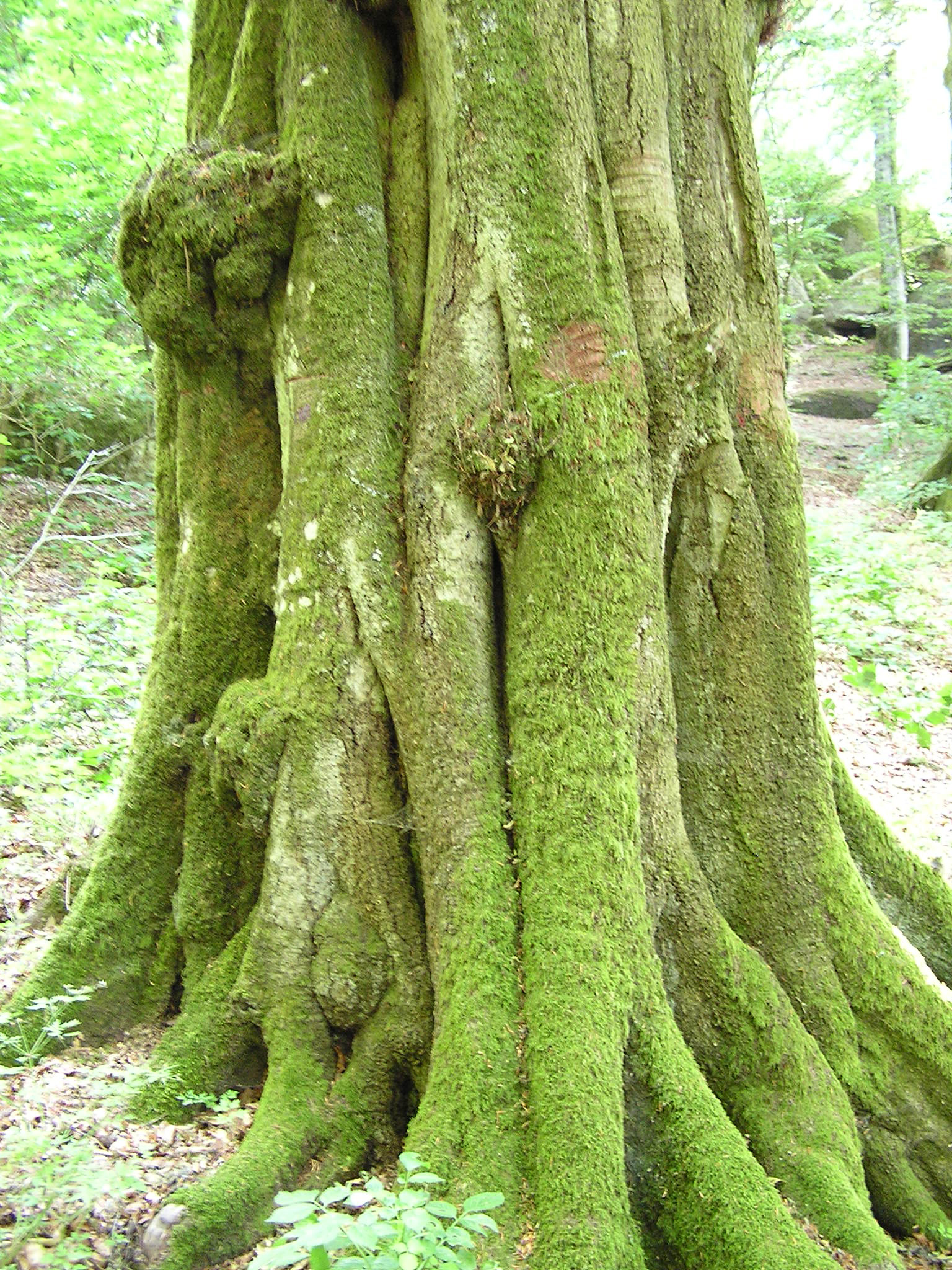 Buche - Monte Cimino (Viterbo)